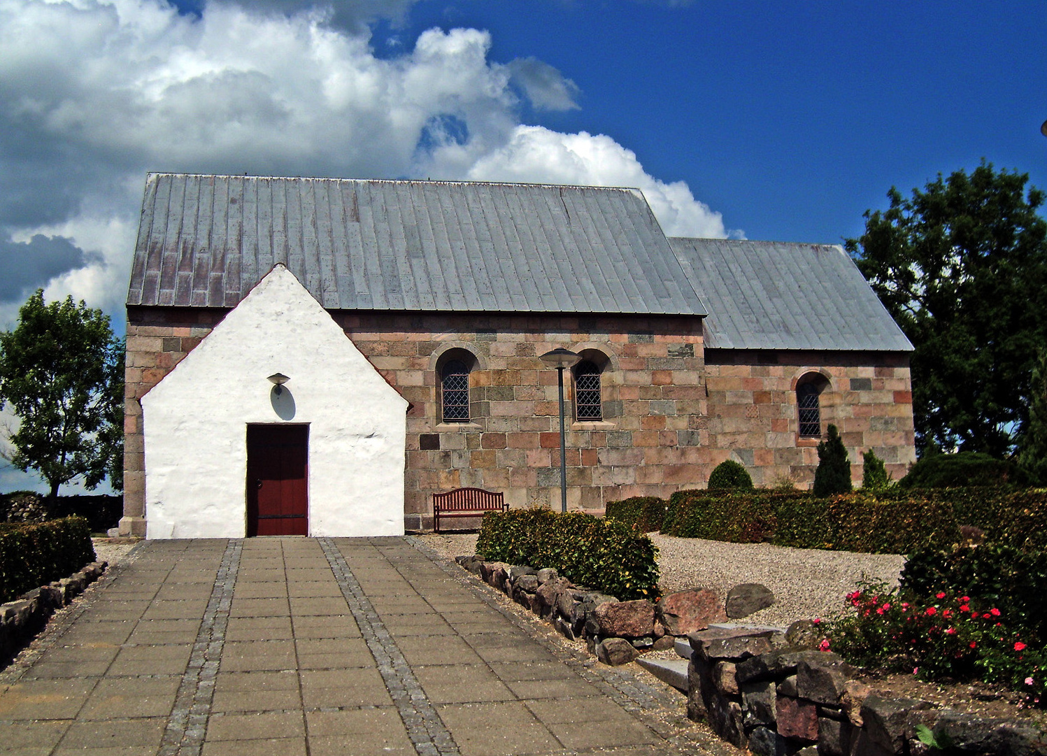 fra syd